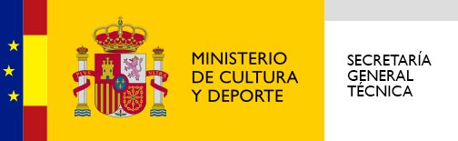 Logotipo de la Secretaría General Técnica del Ministerio de Cultura y Deporte de España